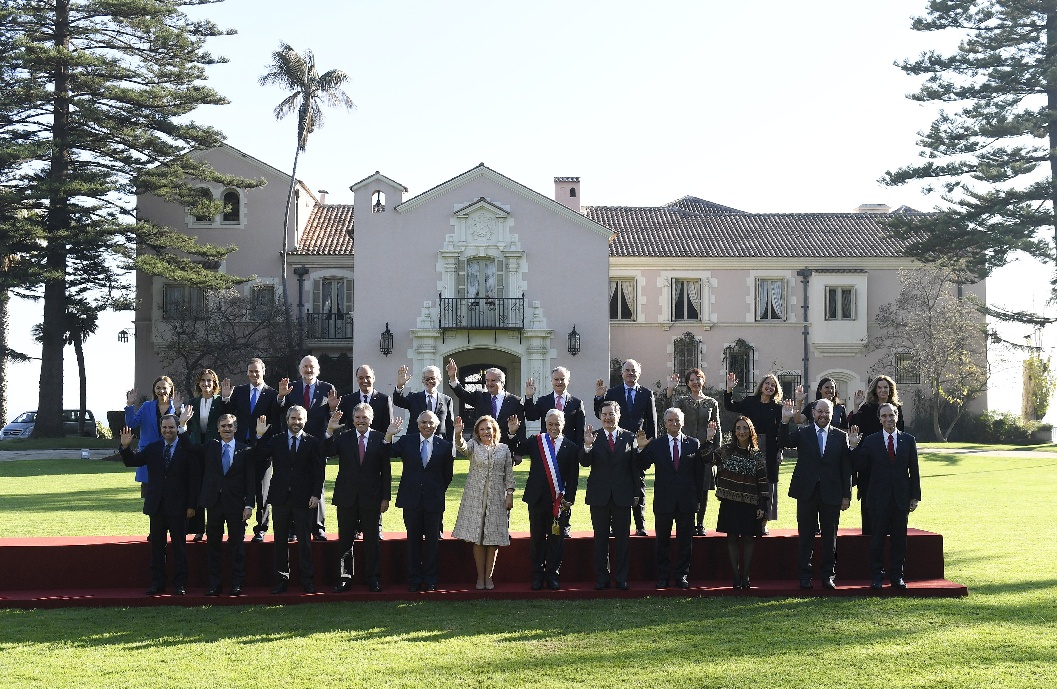 El Presidente de la República, Sebastián Piñera, y la Primera Dama, Cecilia Morel, se toman junto a los 23 ministros del gabinete la fotografía oficial en los jardines de Cerro Castillo antes de la primera Cuenta Pública a la nación.